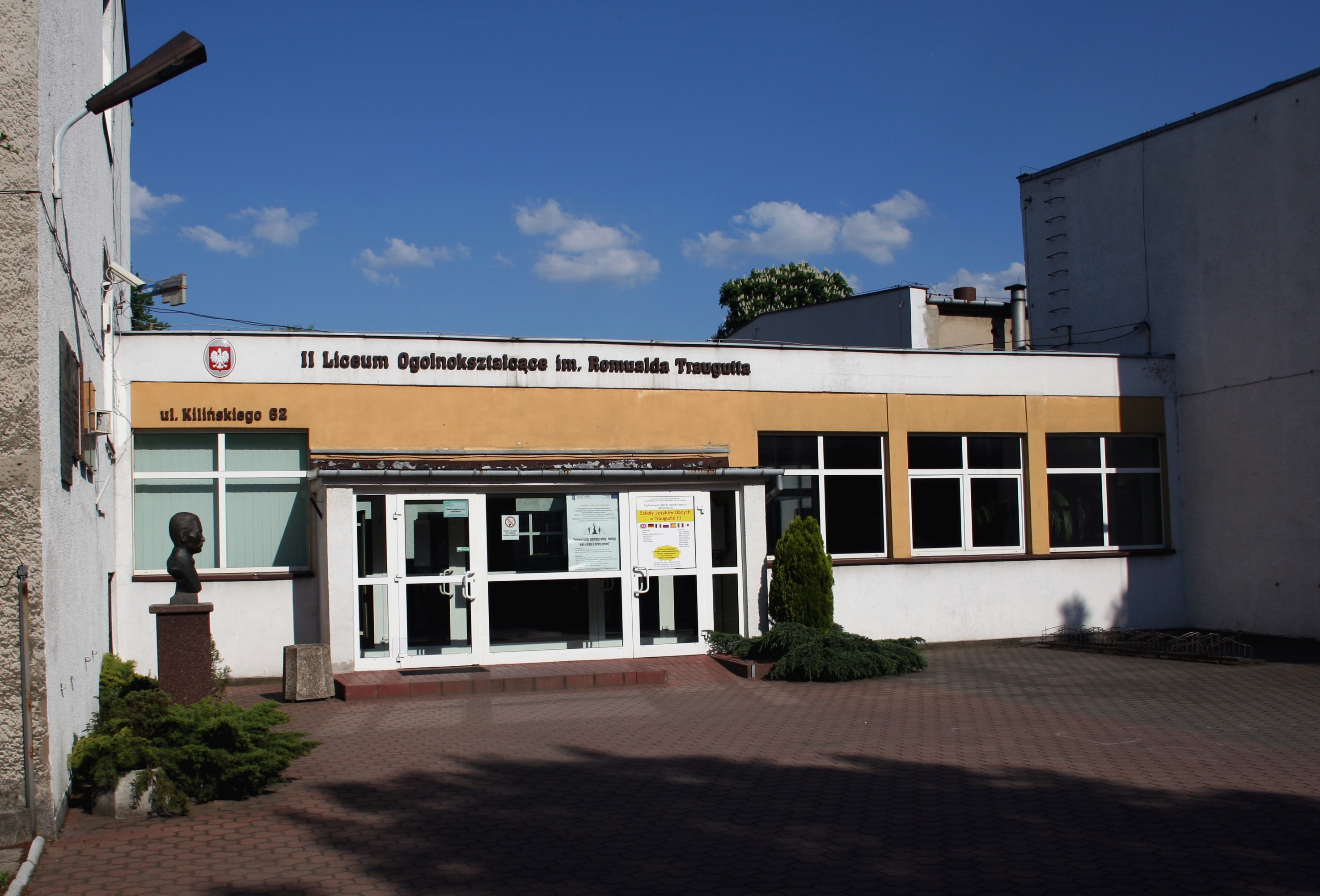 Częstochowa Liceum im. Traugutta